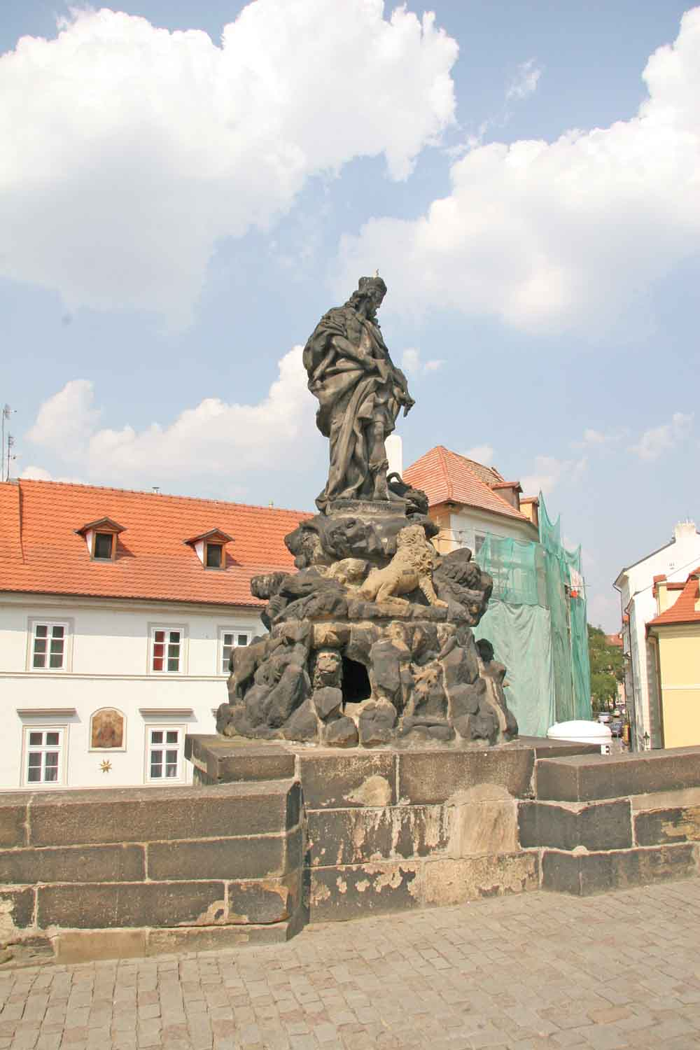 Sousoší Svatého Víta na Karlově mostě